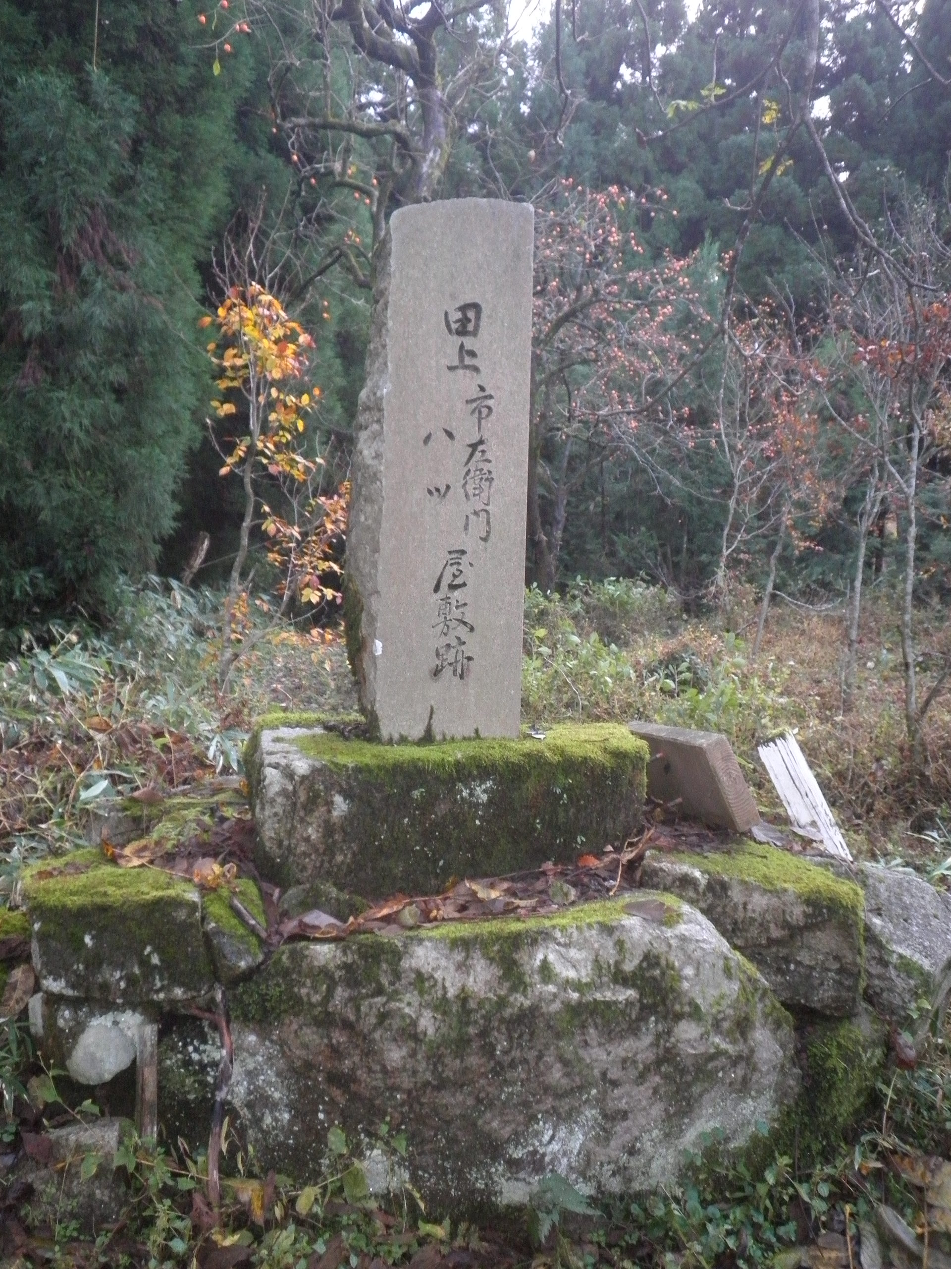 京丹後市大宮町ja:五十河の内山地区にある離村記念碑